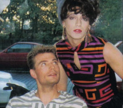 "Andersrum" schwules Fernsehen aus Berlin 1991, David Wilms und BeV Stroganov waren die Moderatoren.